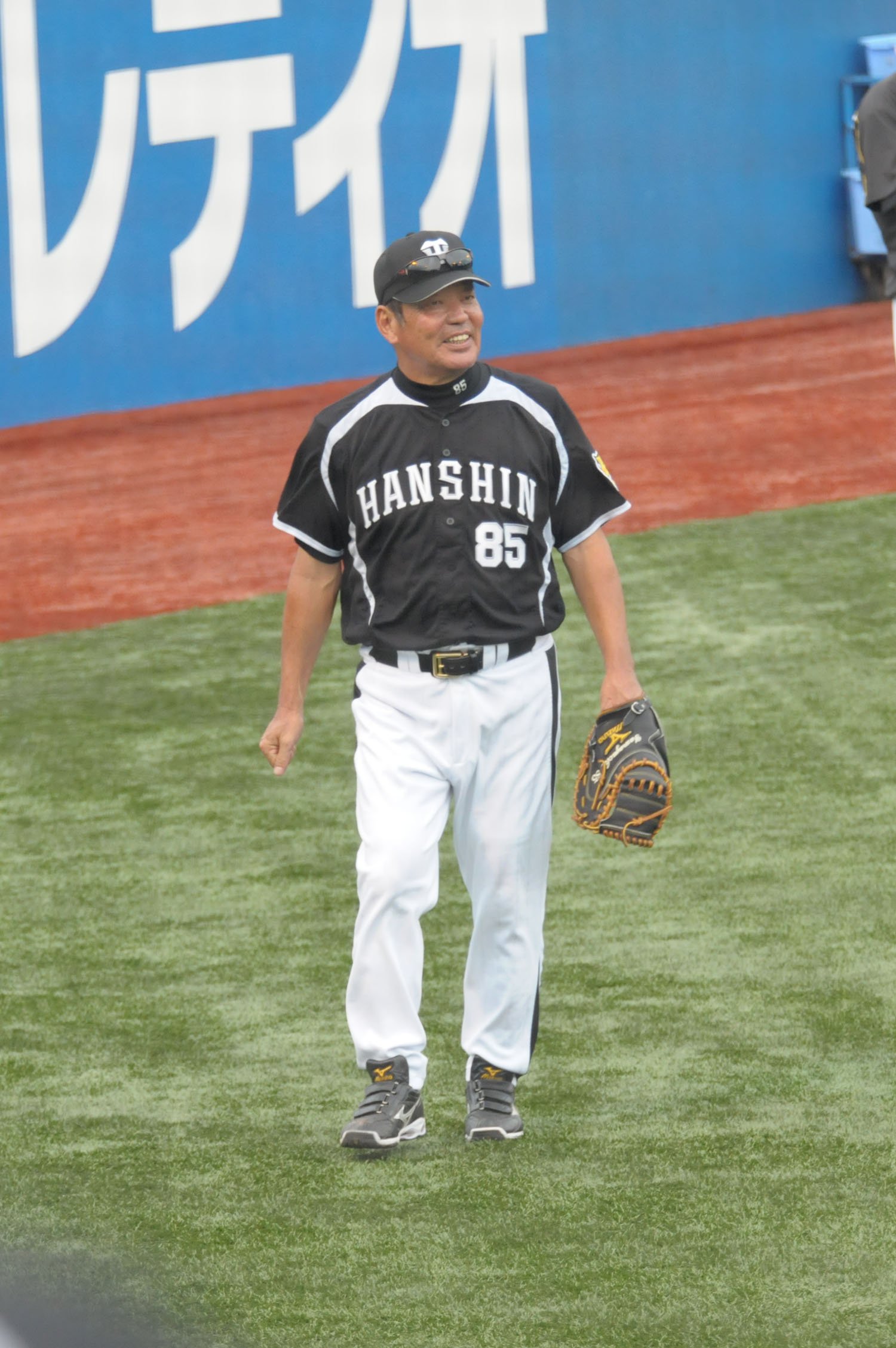 阪神タイガース、山口高志コーチ。神宮球場で。